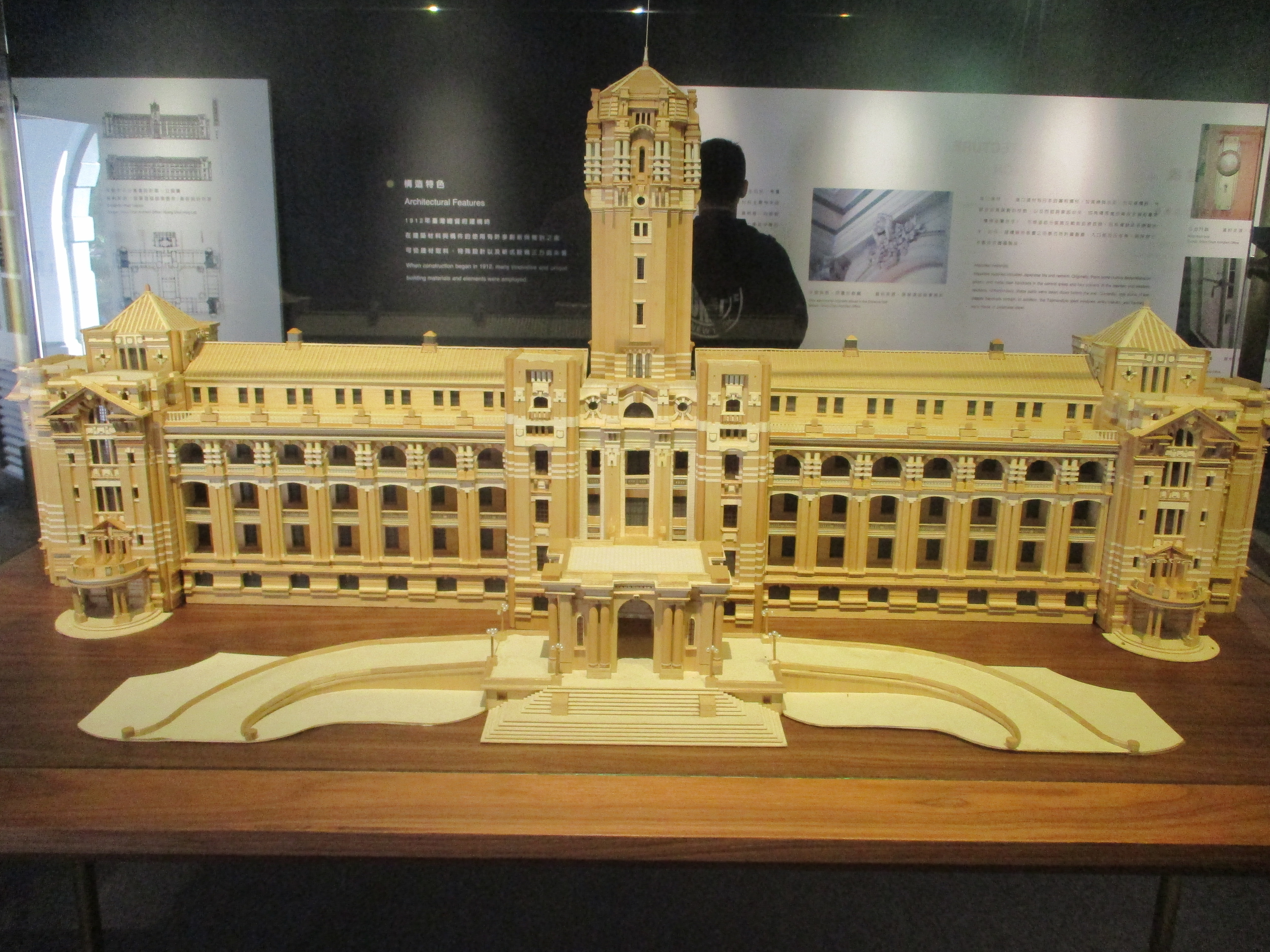 타이완 총독부의 미니어쳐로 1/400으로 제작. 타이베이 총통부 내에 전시.